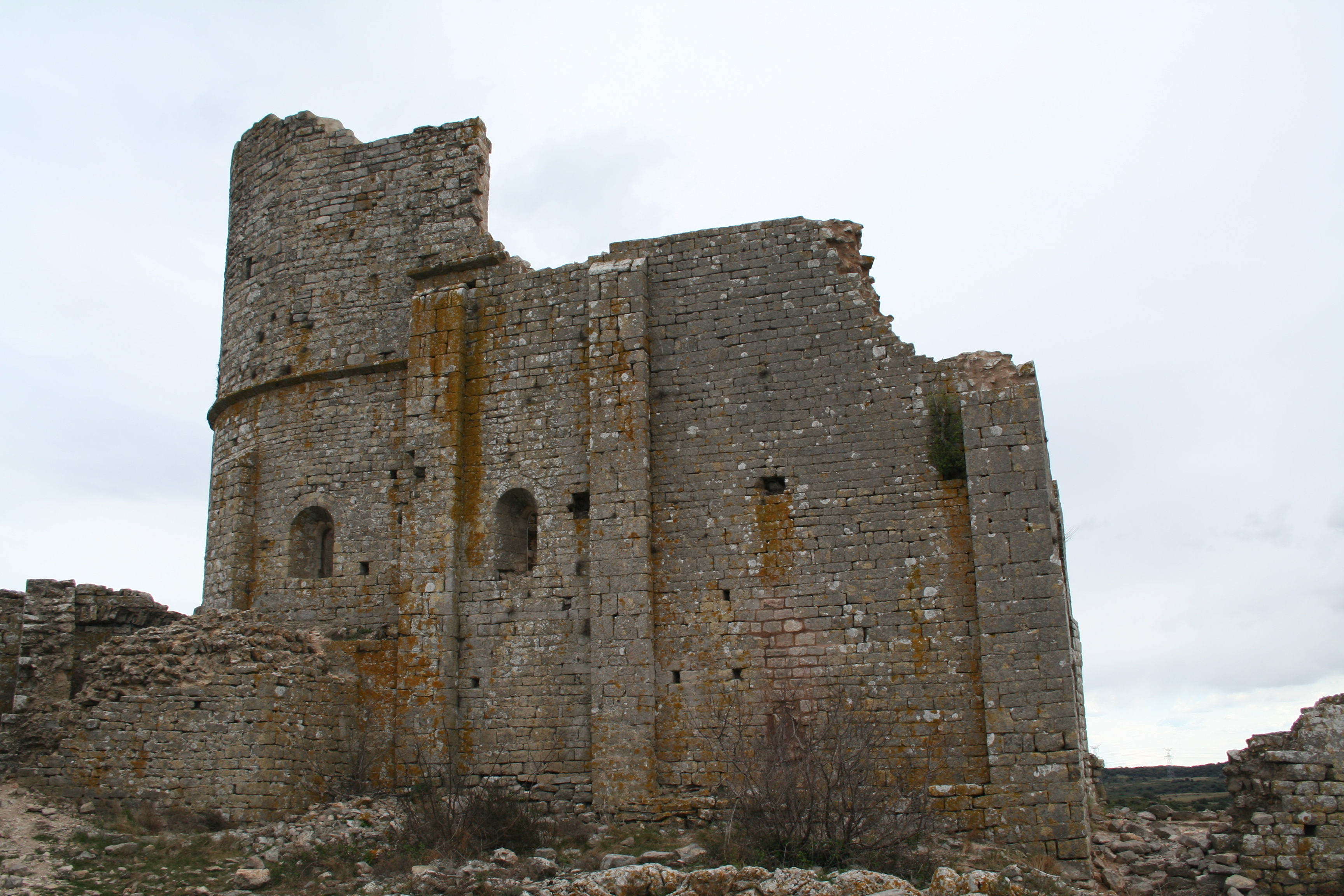 Aumelas (Hérault) - château.